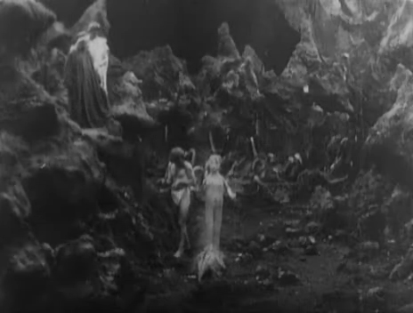 Inferno, milano films, 1911, paolo e francesca